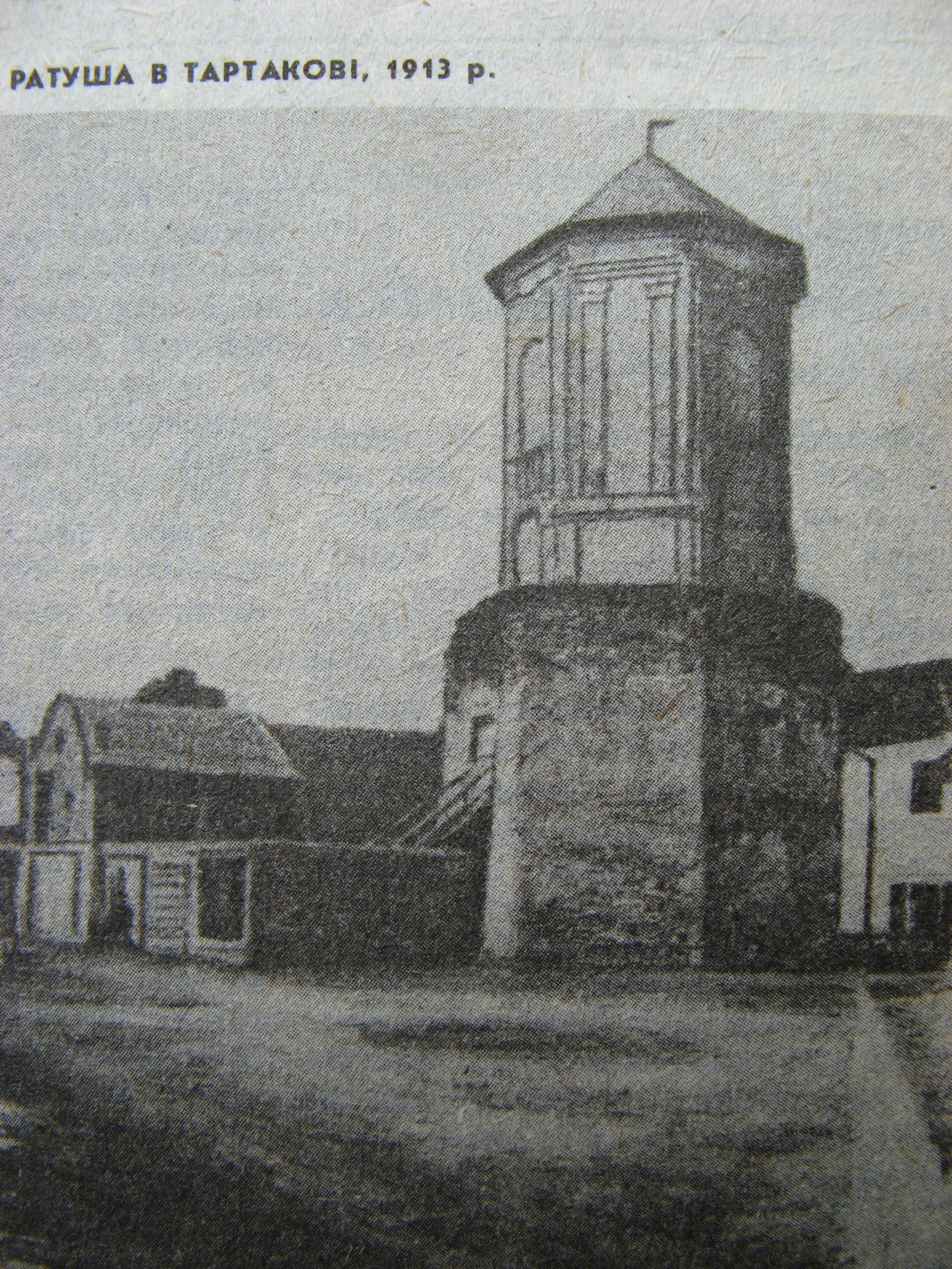 Tartakiv-ratusha: Ратуша в Тартакові